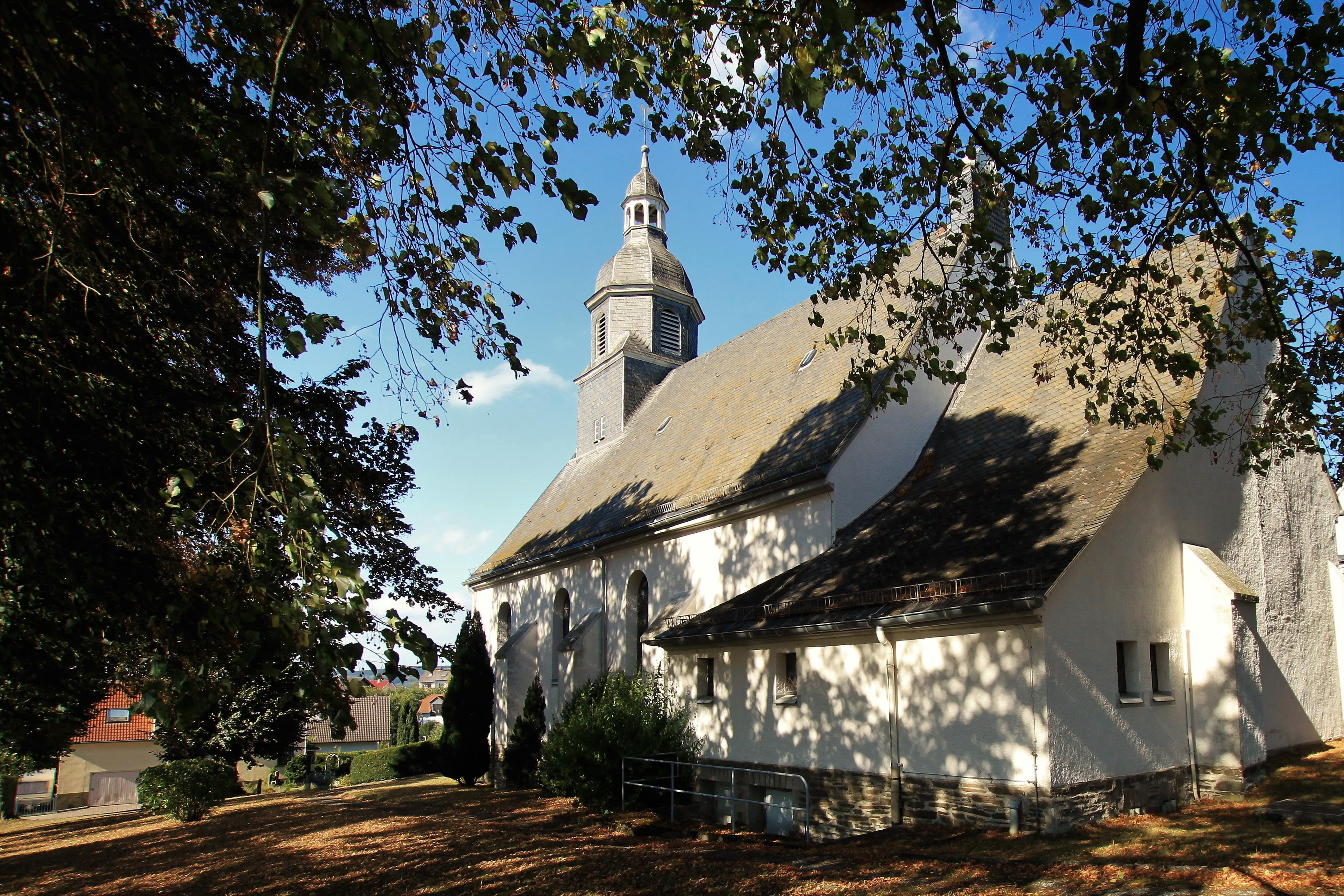 Seelbach, Katholische Kirche